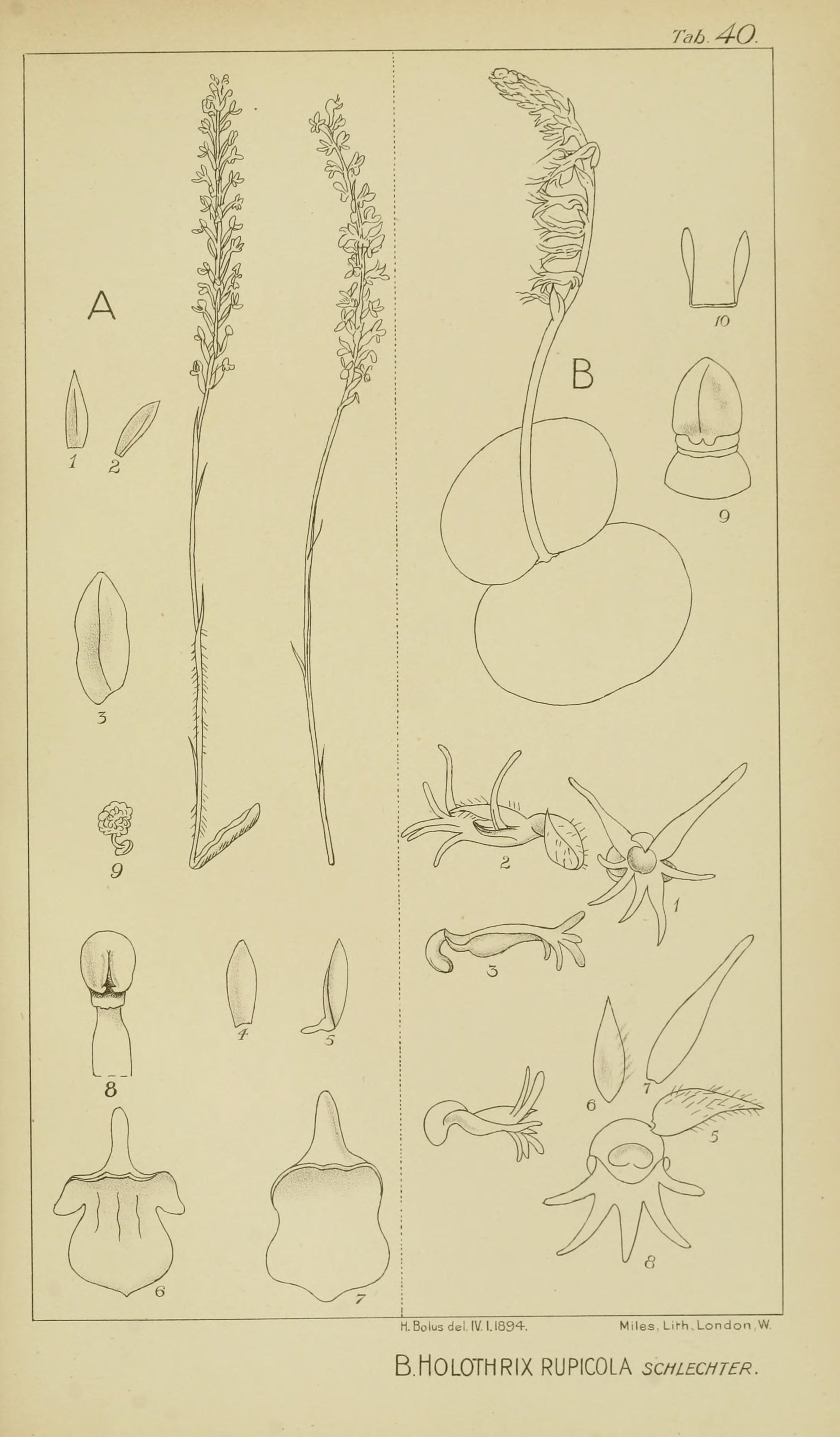 re,b 40. H. Bolus del, IV. 1.1894. Miles, Lifh London VV, B.HOLOTHRIX RUPICOLA schlechter.